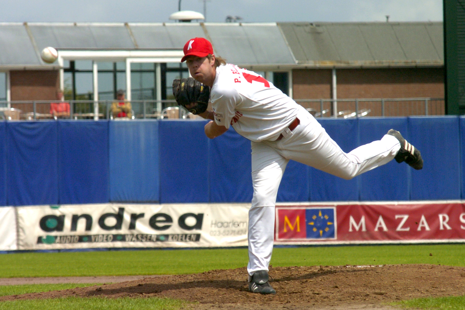 Links handige werper Patrick Beljaards